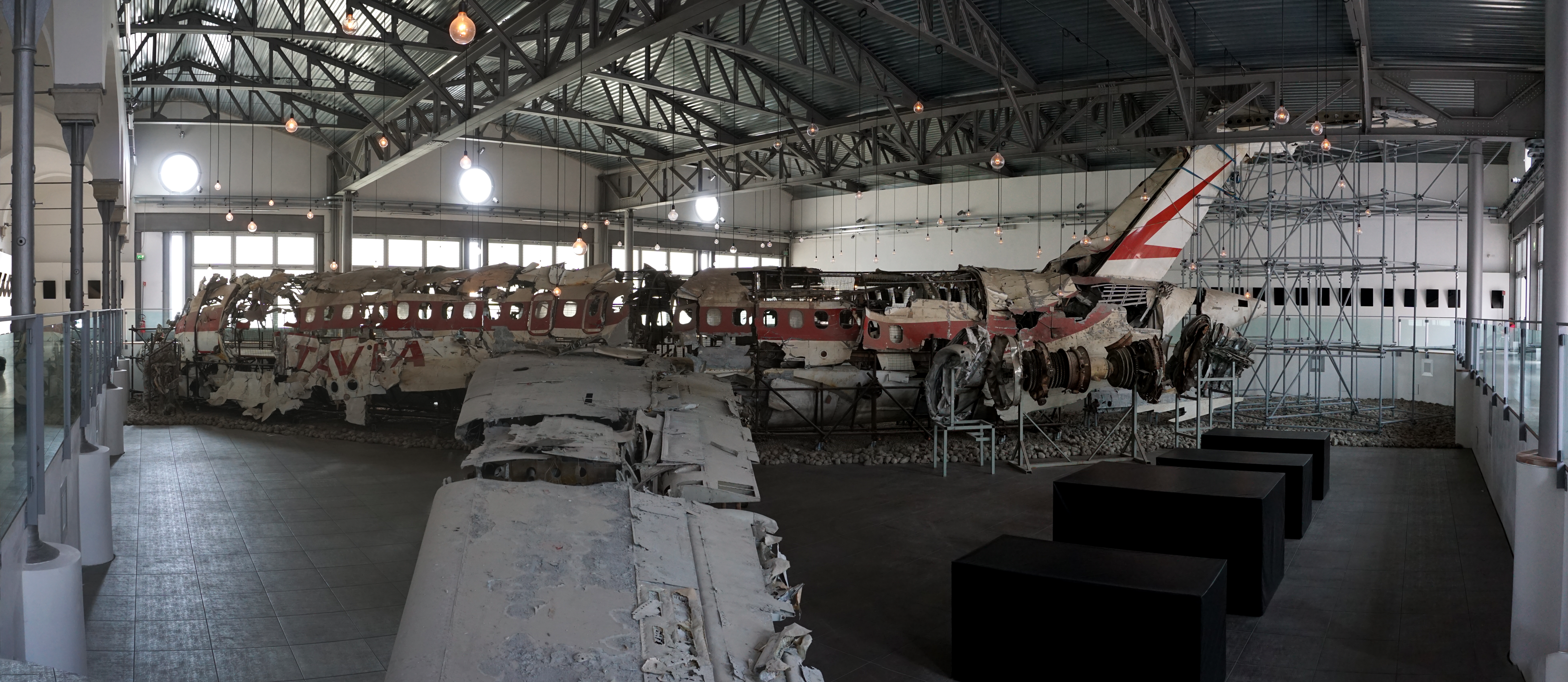 Ex Magazzino ATC - Museo per la memoria di Ustica This is a photo of a monument which is part of cultural heritage of Italy.